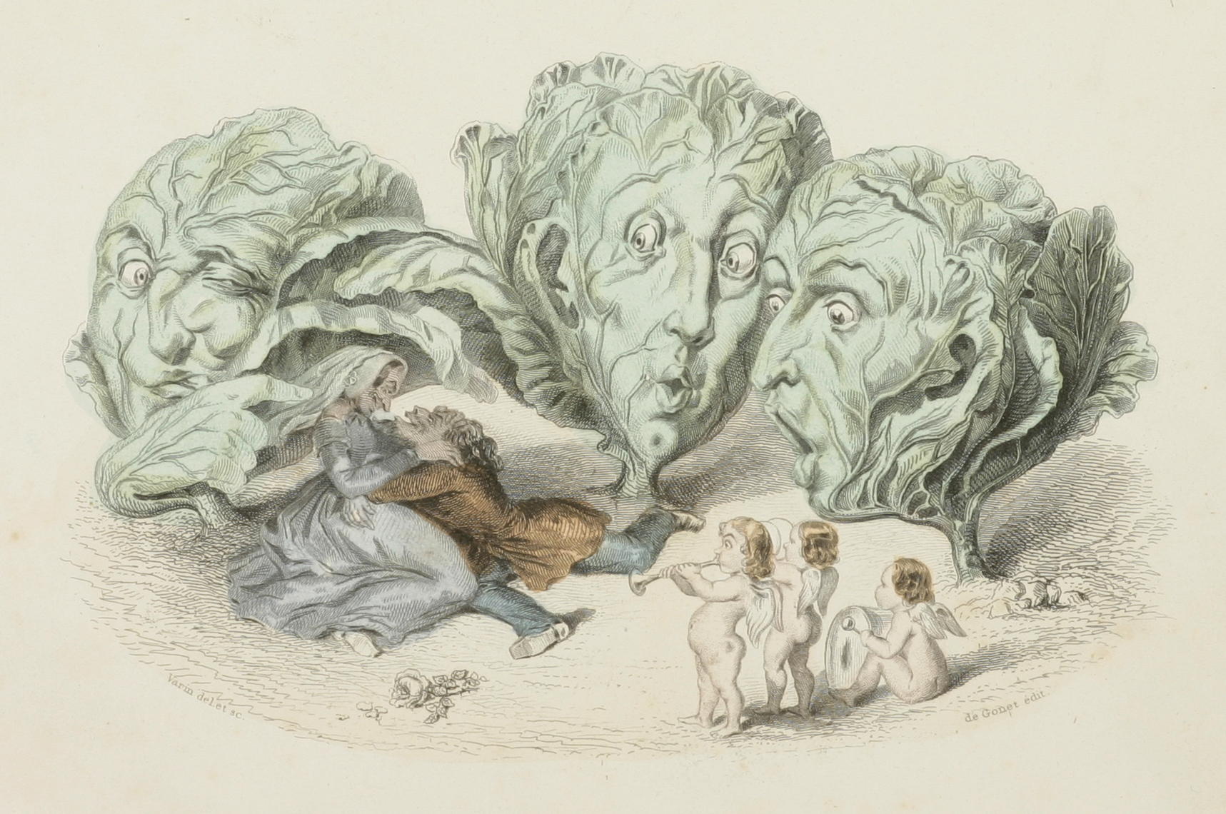 Plate by French printmaker Amédée Varin from "Drôleries végétales. L'Empire des légumes, mémoires de Cucurbitus Ier" by Eugène Nus and Antoine Méray, Paris: Gabriel de Gonet, 1861.